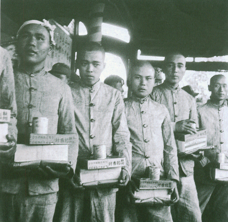 中文（香港）: 和平村的戰俘獲發日用品